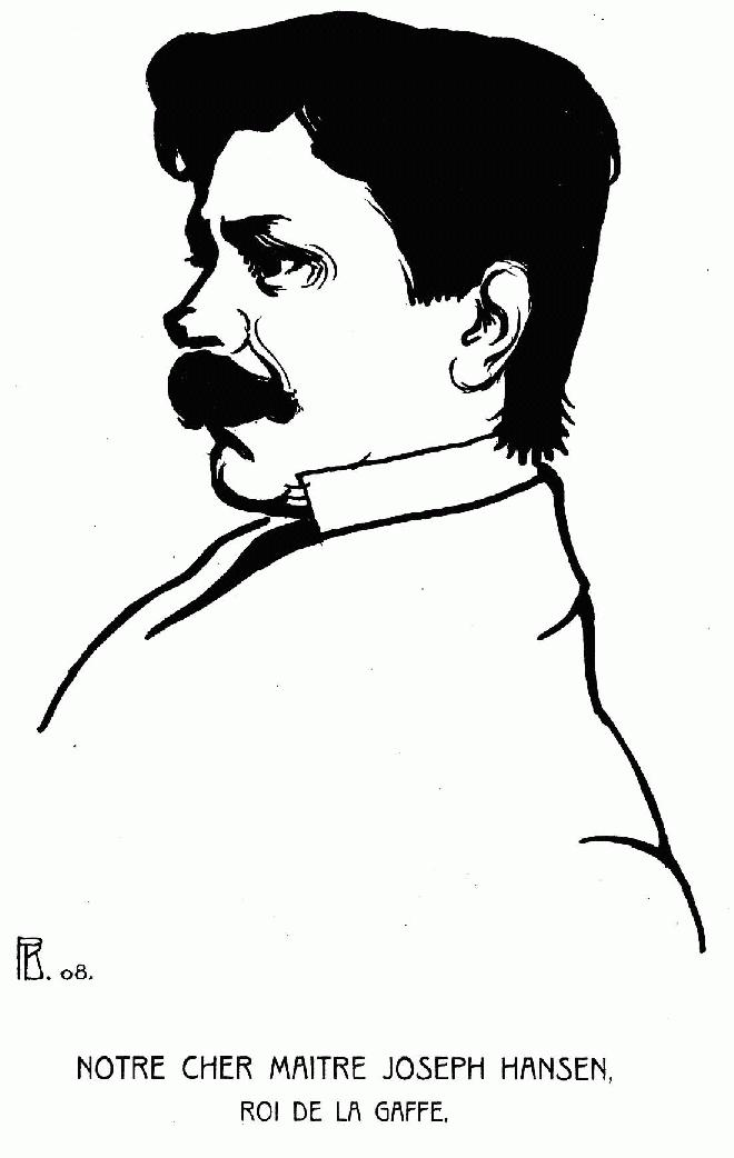 De Joseph Hansen (Zeechnung vum Pierre Blanc)